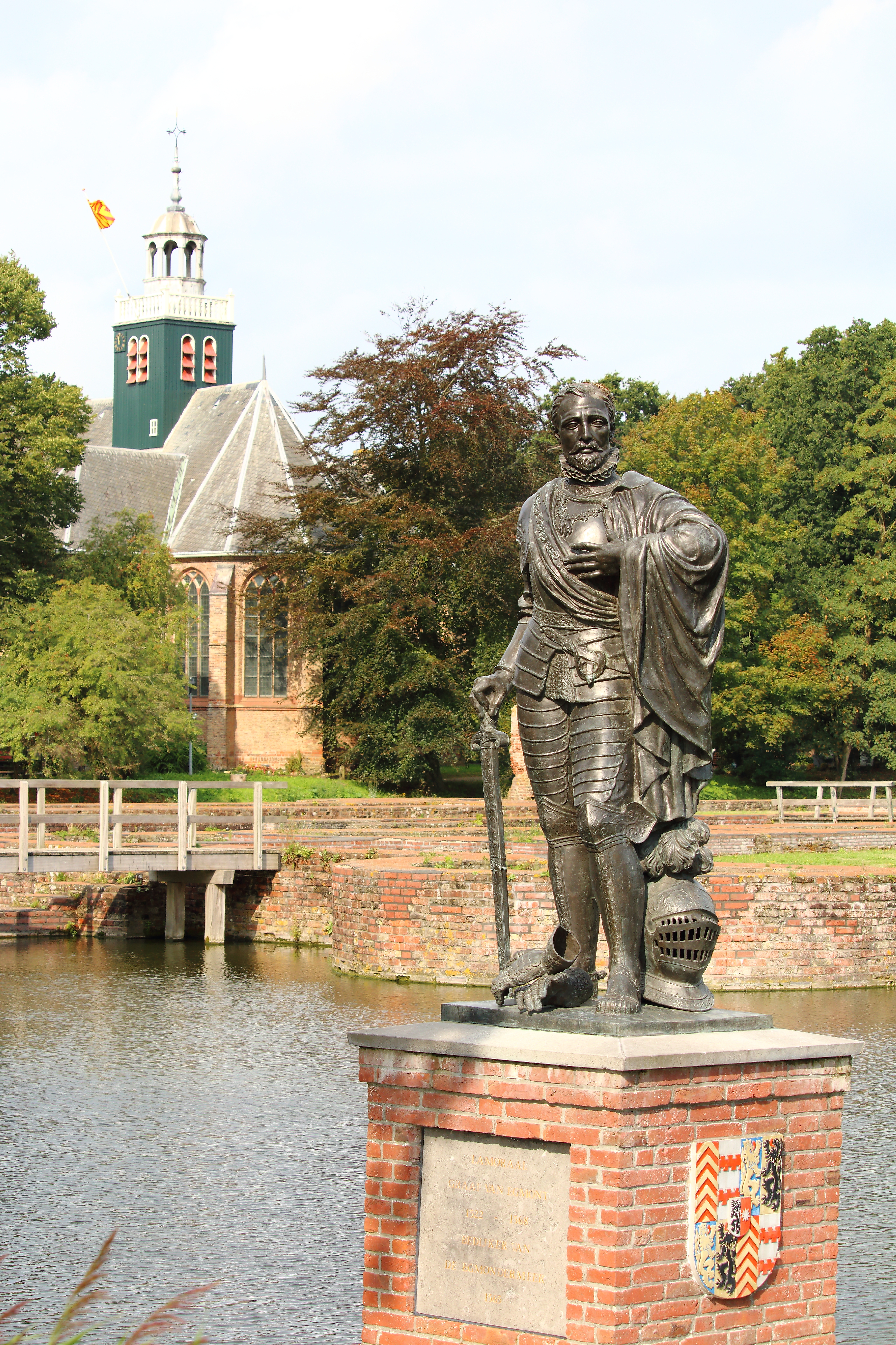 standbeeld van Lamoraal van Egmont, Slot op den Hoef / Kasteel Egmond, Egmond aan den Hoef, Bergen, Noord-Holland, Nederland